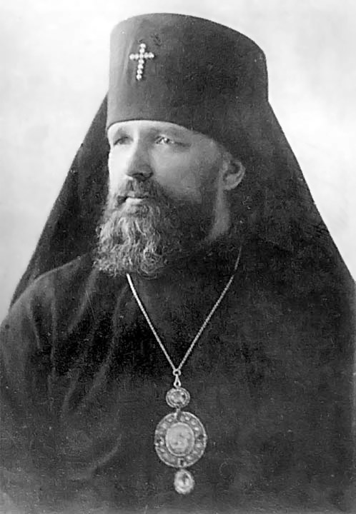 Архиепископ Сергий (Гришин)